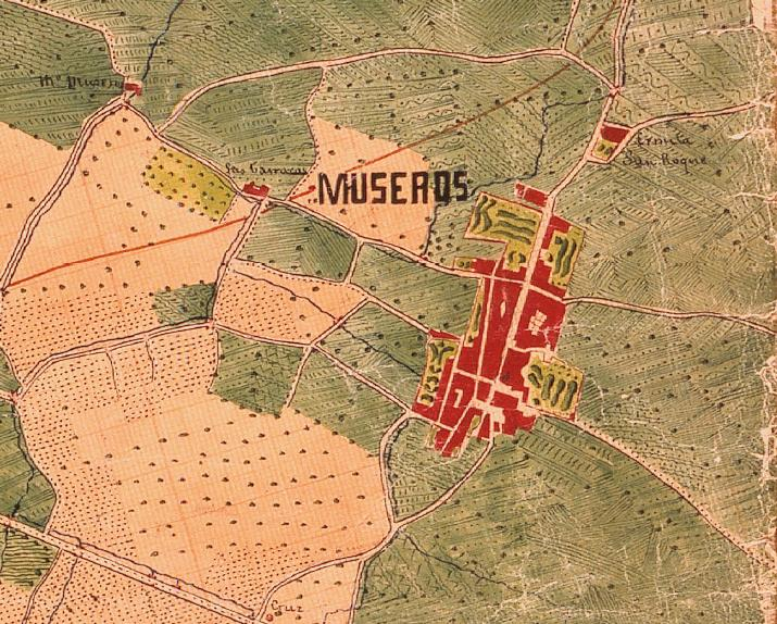 Museros el 1883 (el nord està a la dreta).